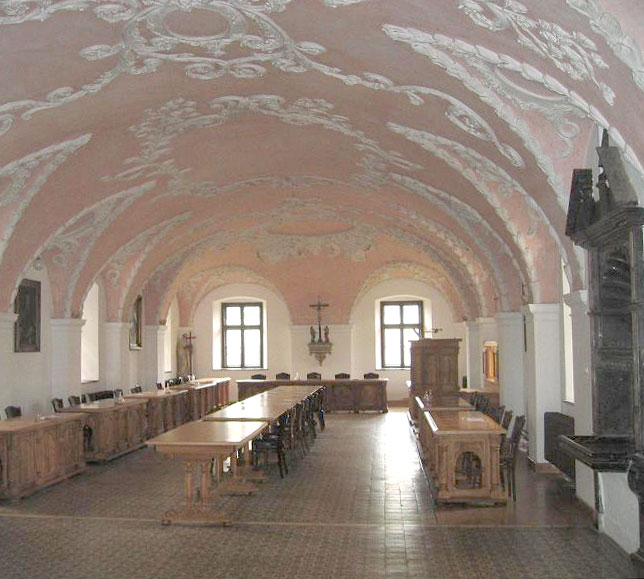 Monastery Sittich, Slovenia / samostan Stična, Slovenija / Kloster Sittich, Slowenien